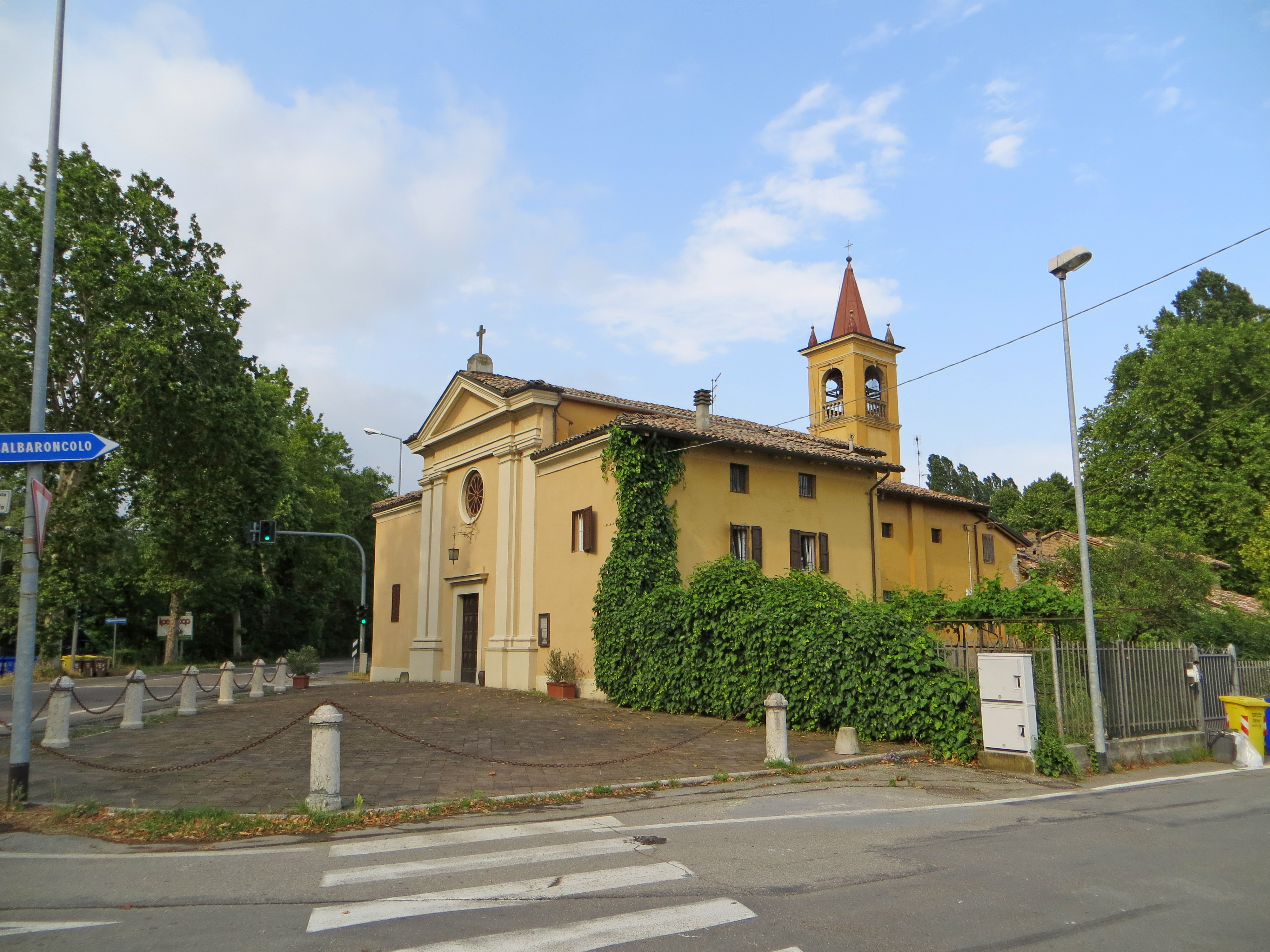 Chiesa di San Biagio (Vicopò, Parma) - facciata e lato sud